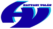 Hatvani Volán logo